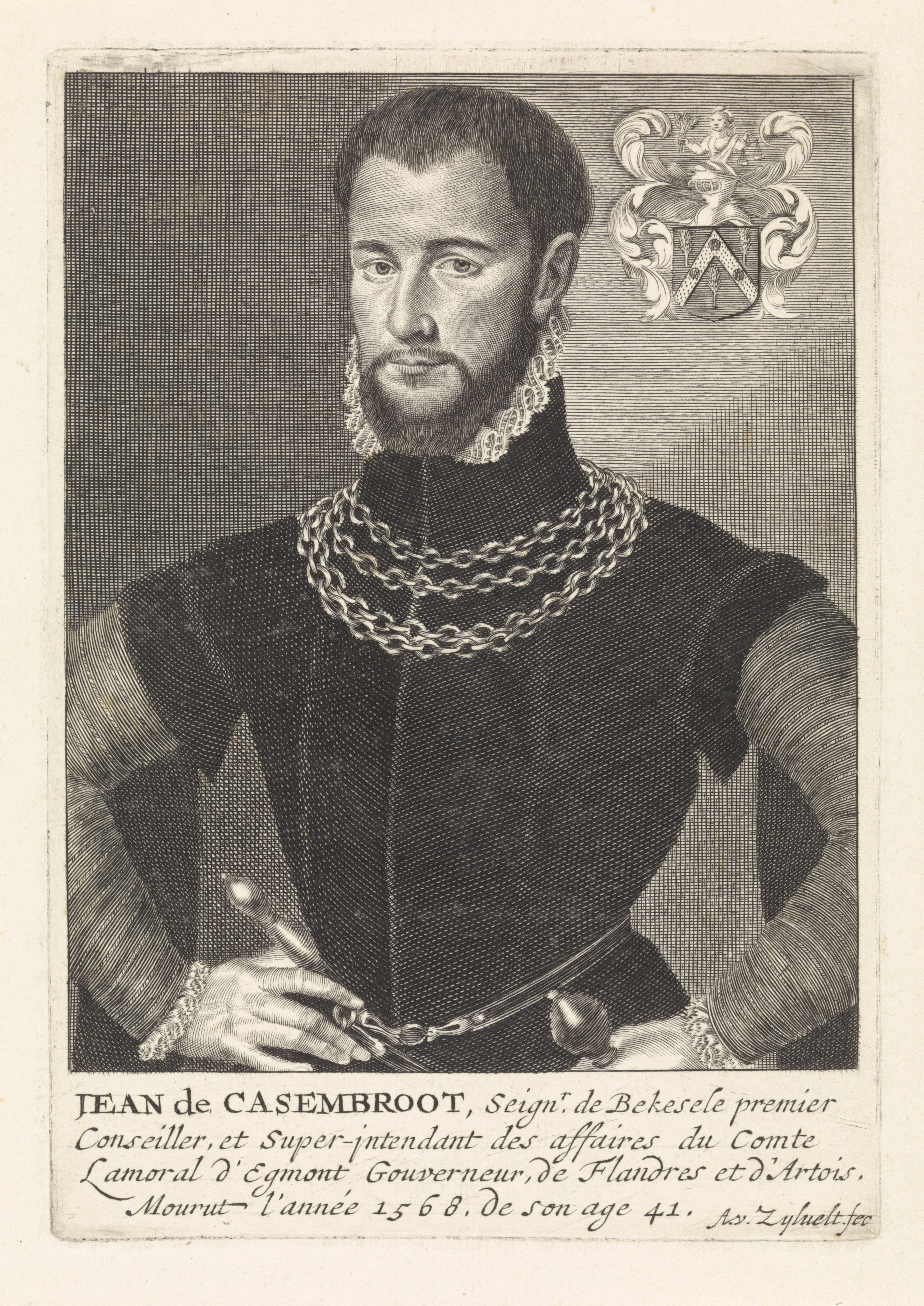 IdentificatieTitel(s): Portret van Jehan de CasembrootObjecttype: prent Objectnummer: RP-P-OB-24.765Catalogusreferentie: Hollstein Dutch 27Opschriften / Merken: verzamelaarsmerk, verso, gestempeld: Lugt 240Omschrijving: Portret van Jehan de Casembroot, raadsheer en secretaris van Lamoraal graaf van Egmond. Rechtsboven zijn wapenschild.VervaardigingVervaardiger: prentmaker: Anthony van Zijlvelt (vermeld op object)Plaats vervaardiging: AmsterdamDatering: 1650 - 1695Fysieke kenmerken: gravureMateriaal: papier Techniek: graveren (drukprocedé)Afmetingen: plaatrand: h 159 mm × b 112 mmOnderwerpWie: Jehan de CasembrootVerwerving en rechtenVerwerving: overdracht van beheer 1816Copyright: Publiek domein